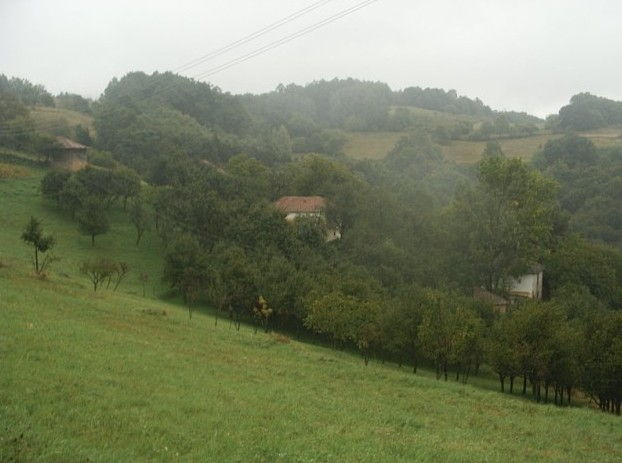 Дикава.